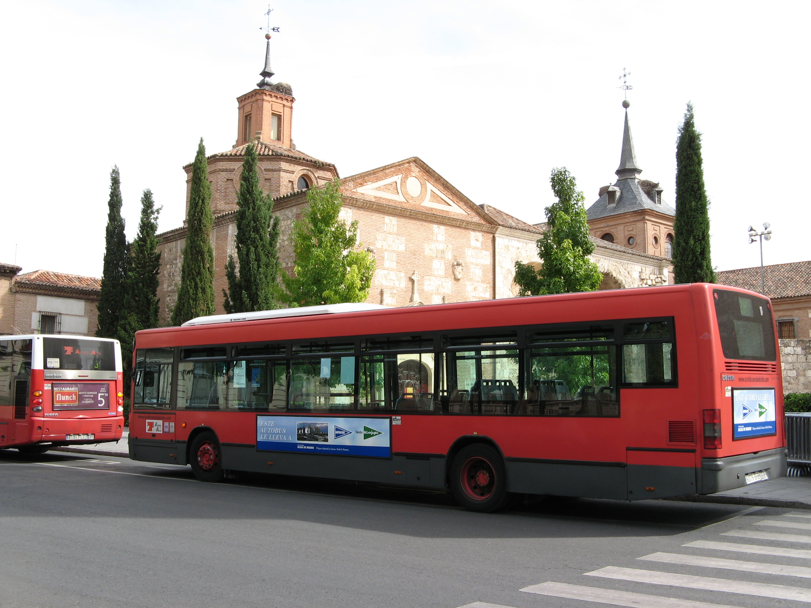 Autobús urbano en la Plaza de Cervantes. Alcalá de Henares. Comunidad de Madrid. España